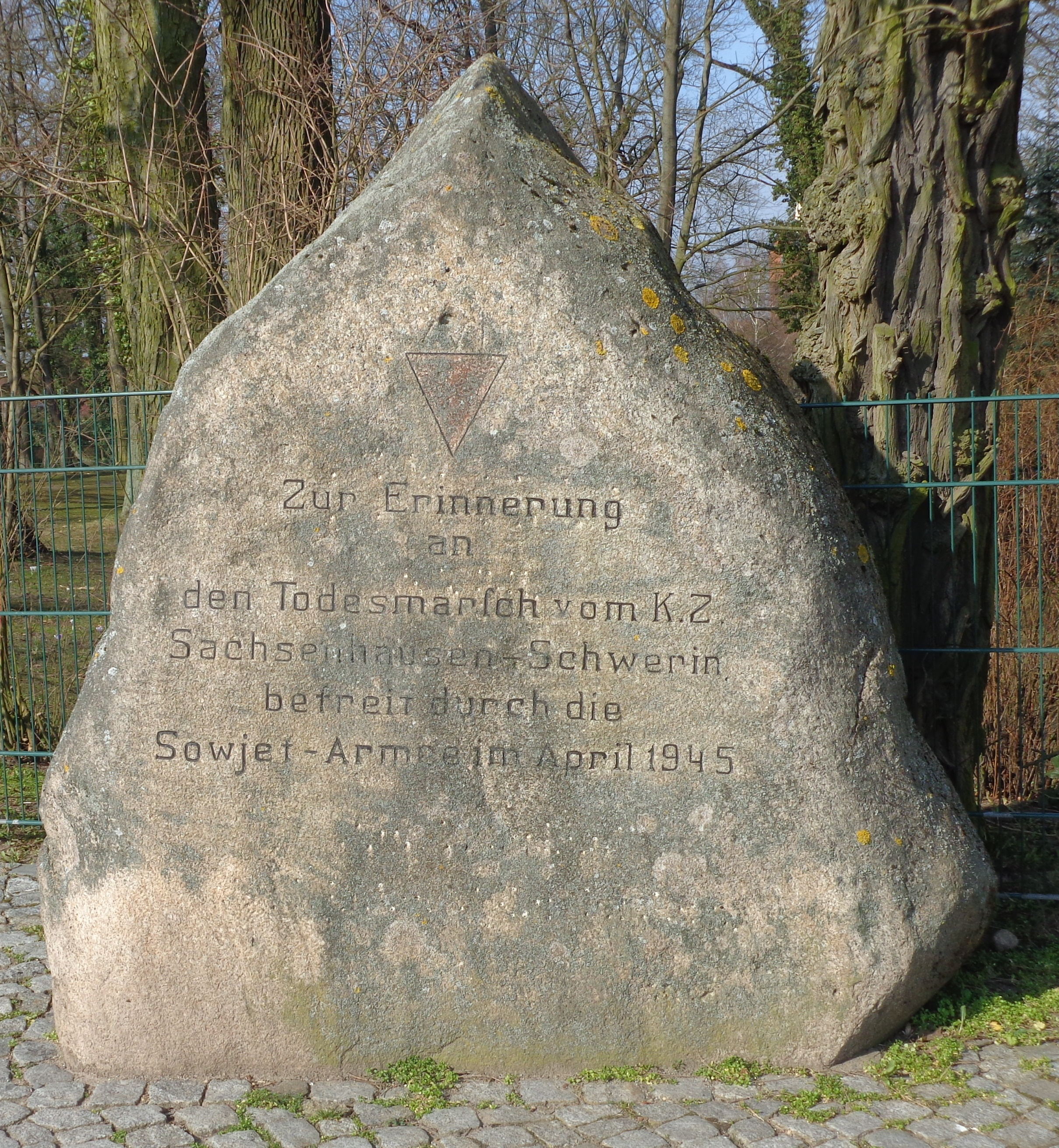 Gedenkstein in Meyenburg für die Opfer des Todesmarschs im April 1945